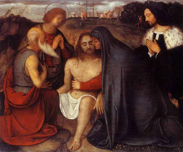 Pietà con San Juan Evangelista, San Jerónimo y donantetitle QS:P1476,es:"Pietà con San Juan Evangelista, San Jerónimo y donante" label QS:Les,"Pietà con San Juan Evangelista, San Jerónimo y donante"